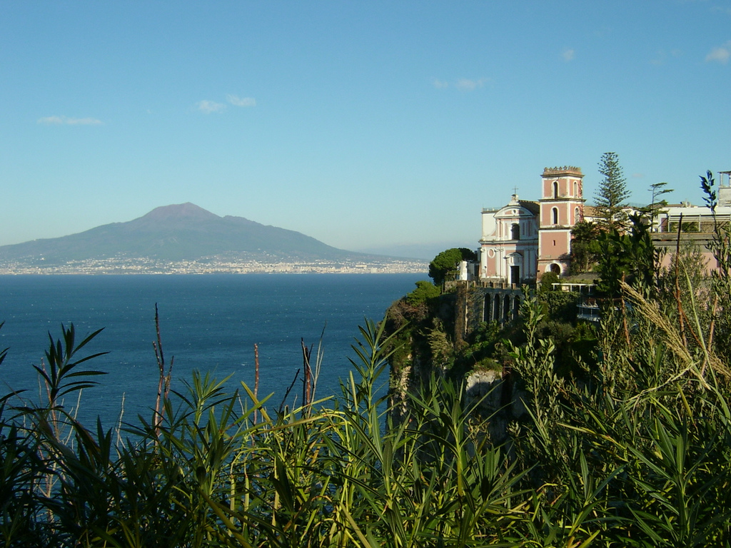 Vesuv seen from the town of Vico Equense. primo piano è castello di Vico Equense,e poi Vesuvio